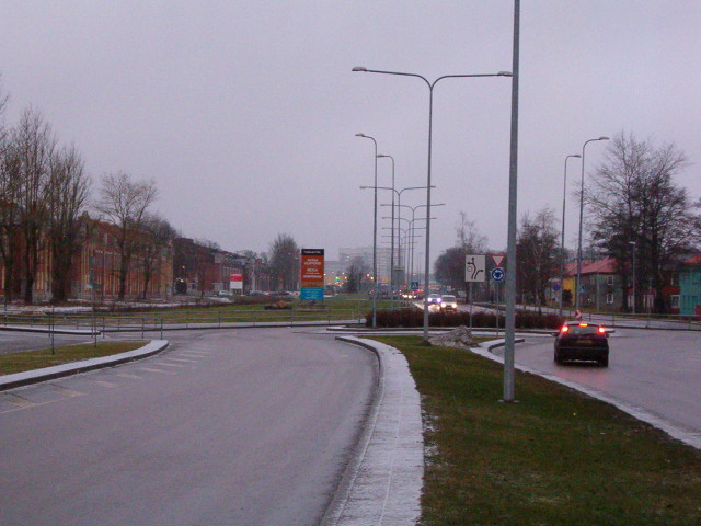 Vaade pikki Tondi tänavat Linnu tee poolt. Tallinn.